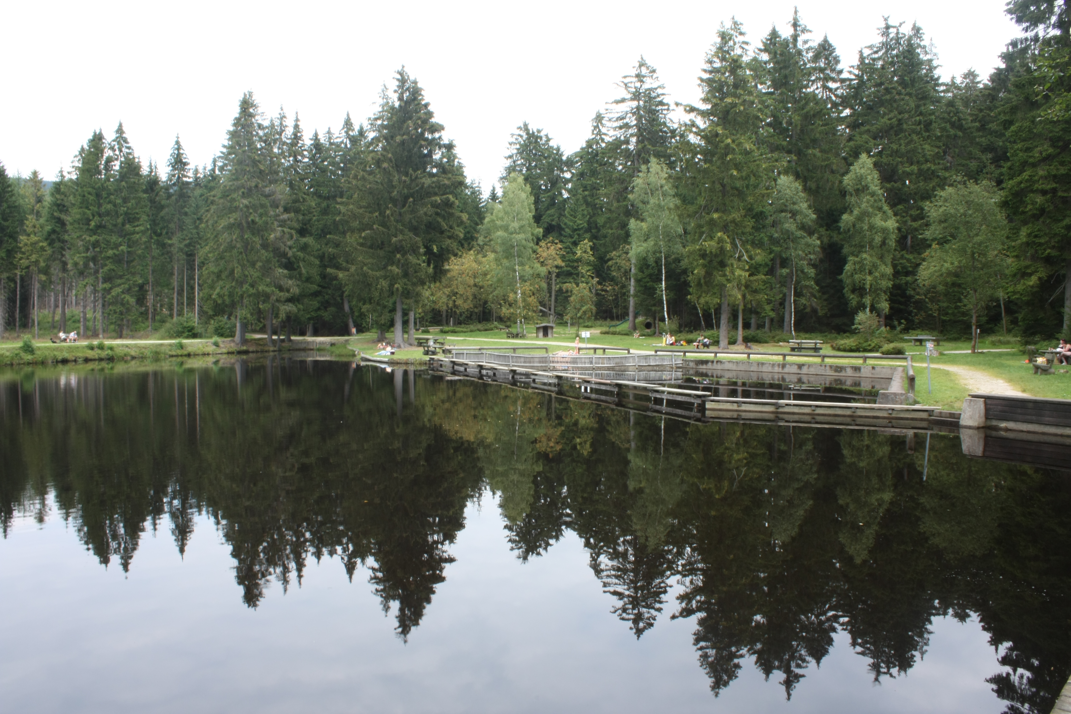 Naturmoorbad in Warmensteinach (Ortsteil Fleckl)